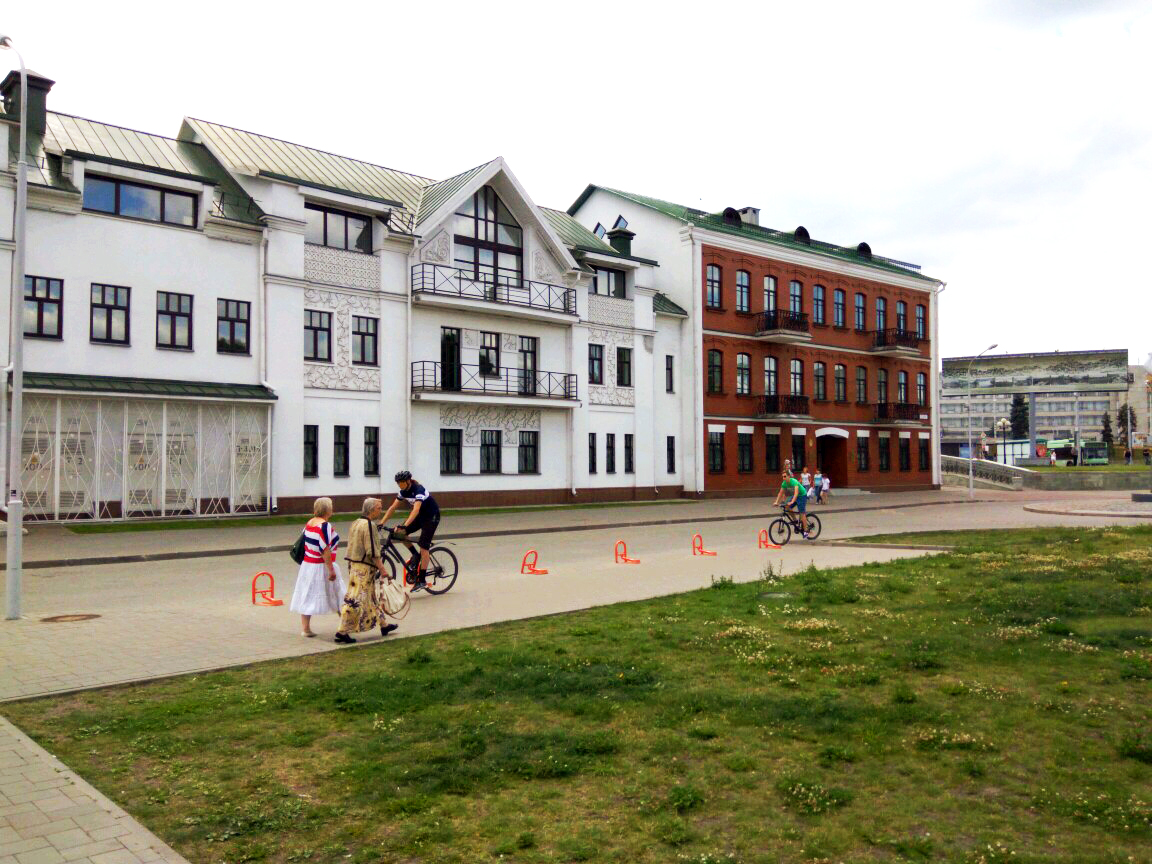 Мінск. Зыбіцкая вуліца